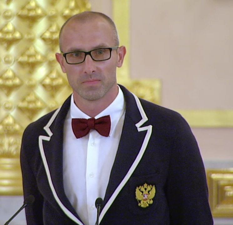 Волейболист Сергей Тетюхин на встрече Олимпийской сборной России с президентом РФ перед Олимпиадой в Рио